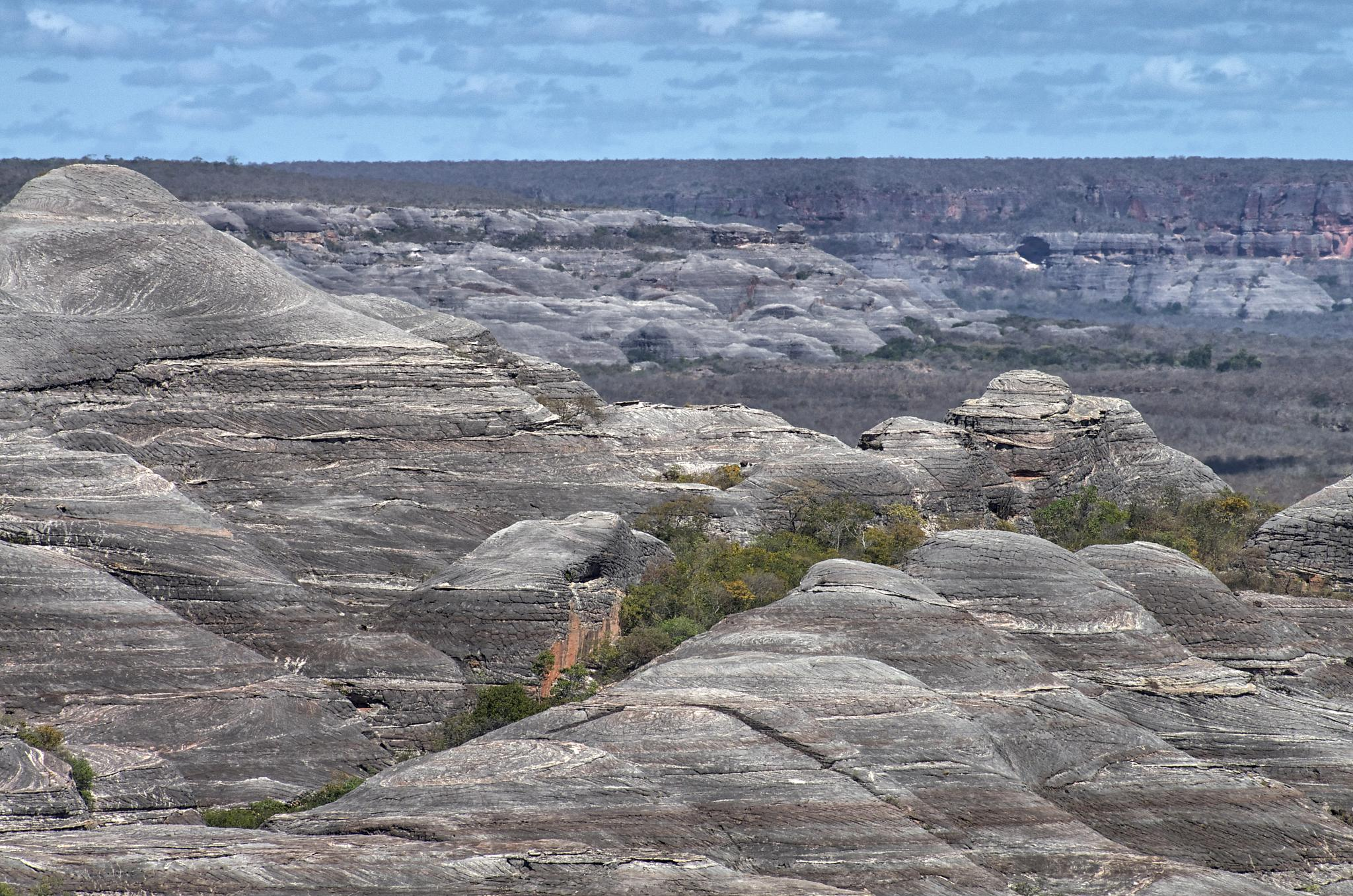 Paisagem com rochedos no interior do parque nacional da Serra das Confusões